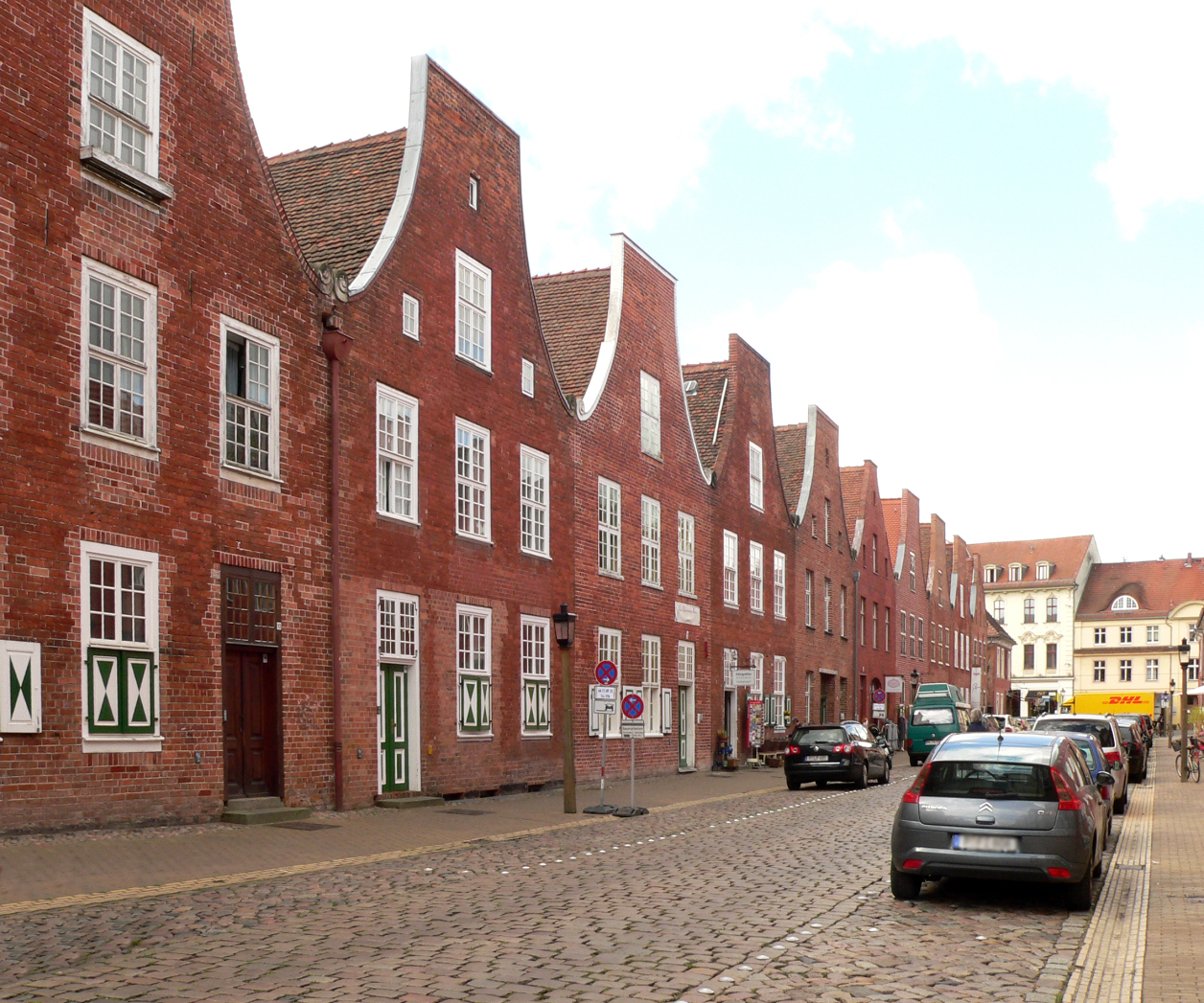 Holländisches Viertel Potsdam